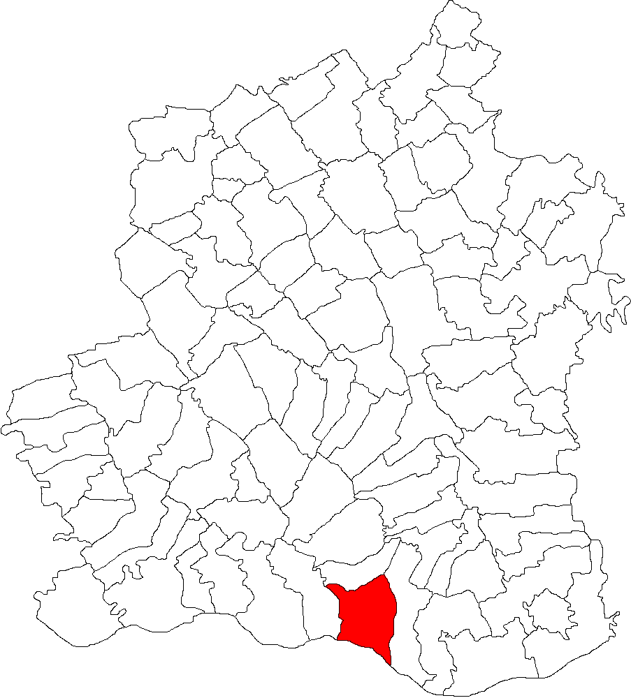 Categorie:Hărţi ale judeţului Teleorman